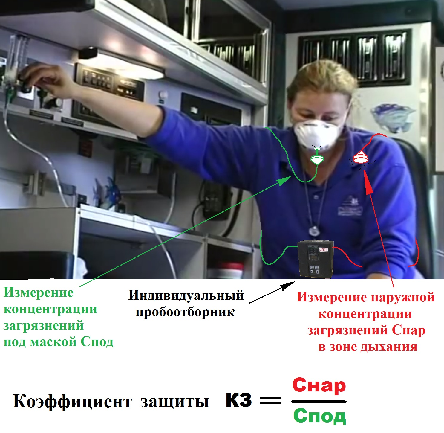 Иллюстрация к статье о измерениях защитных свойств респираторов во время работы в производственных условиях